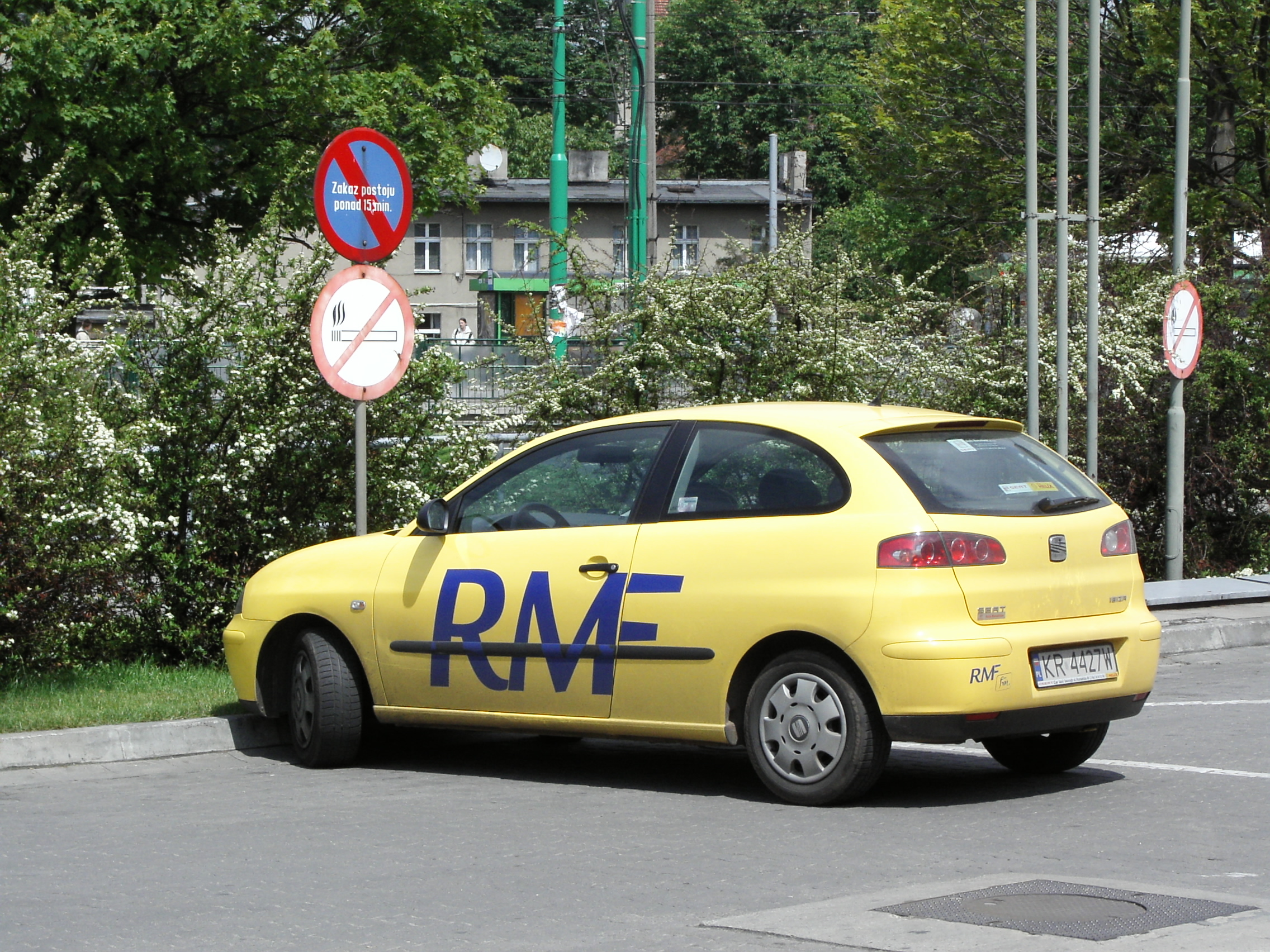 Seat Ibiza. Osobowy wóz reporterski RMF FM w Poznaniu.